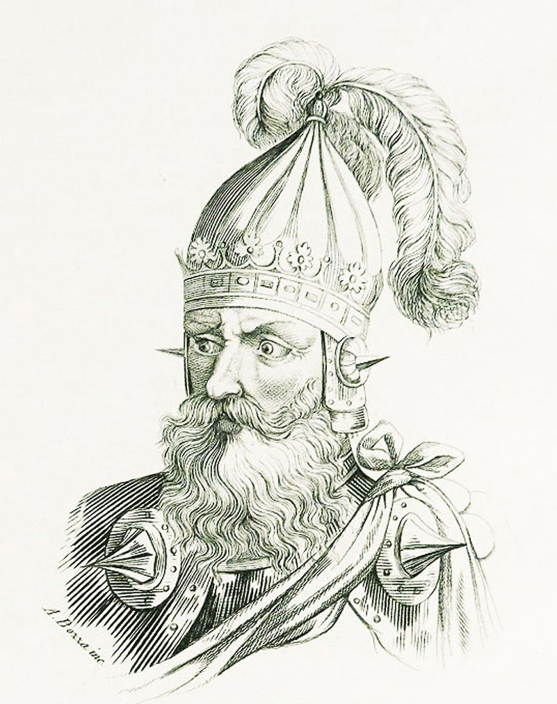 Воображаемый портрет великого князя литовского Миндовга